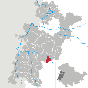 Immelborn in Thuringia - Wartburgkreis